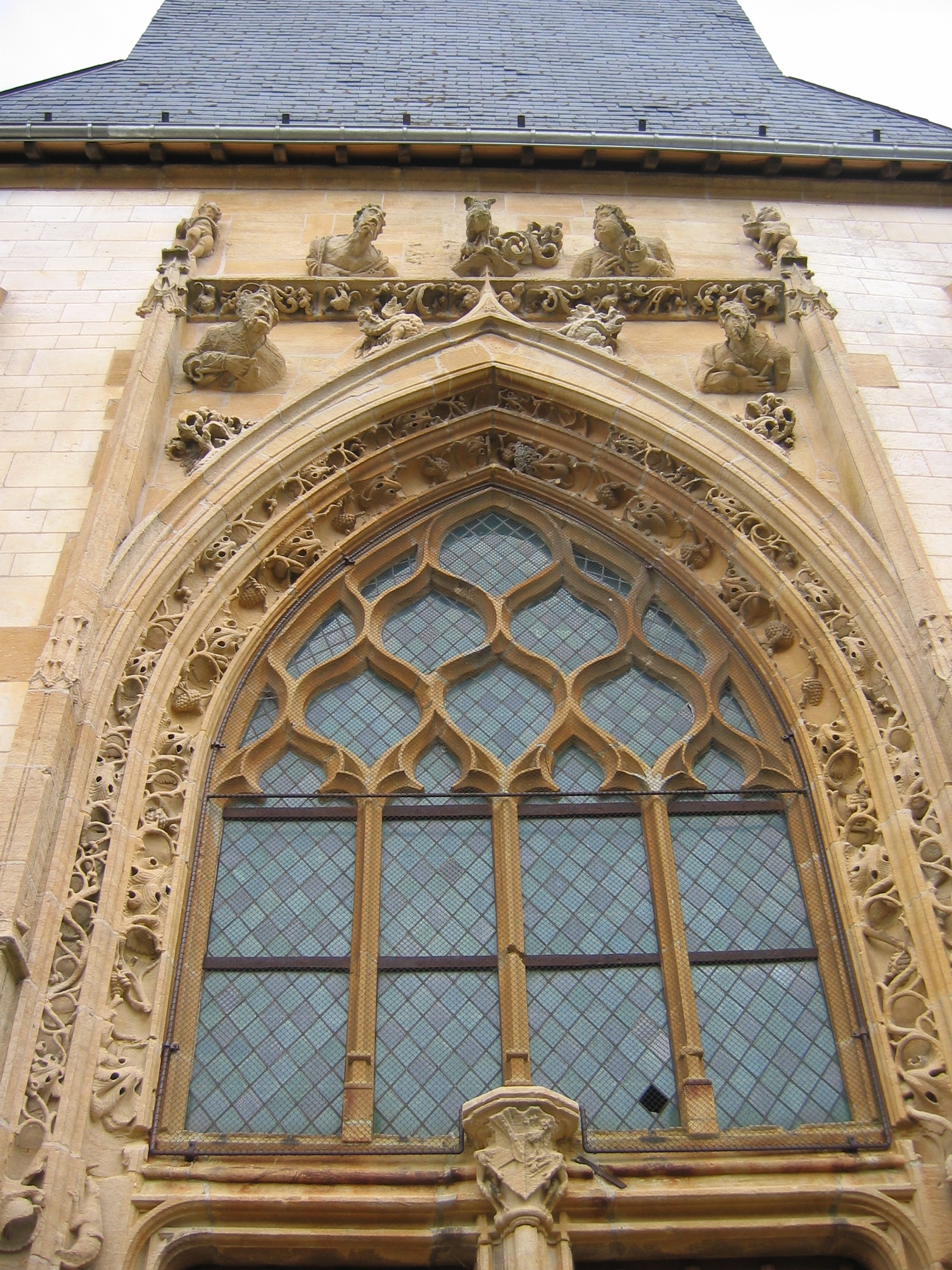 Eglise de Savigny-sur-Aisne en Ardennes France, détail du portail